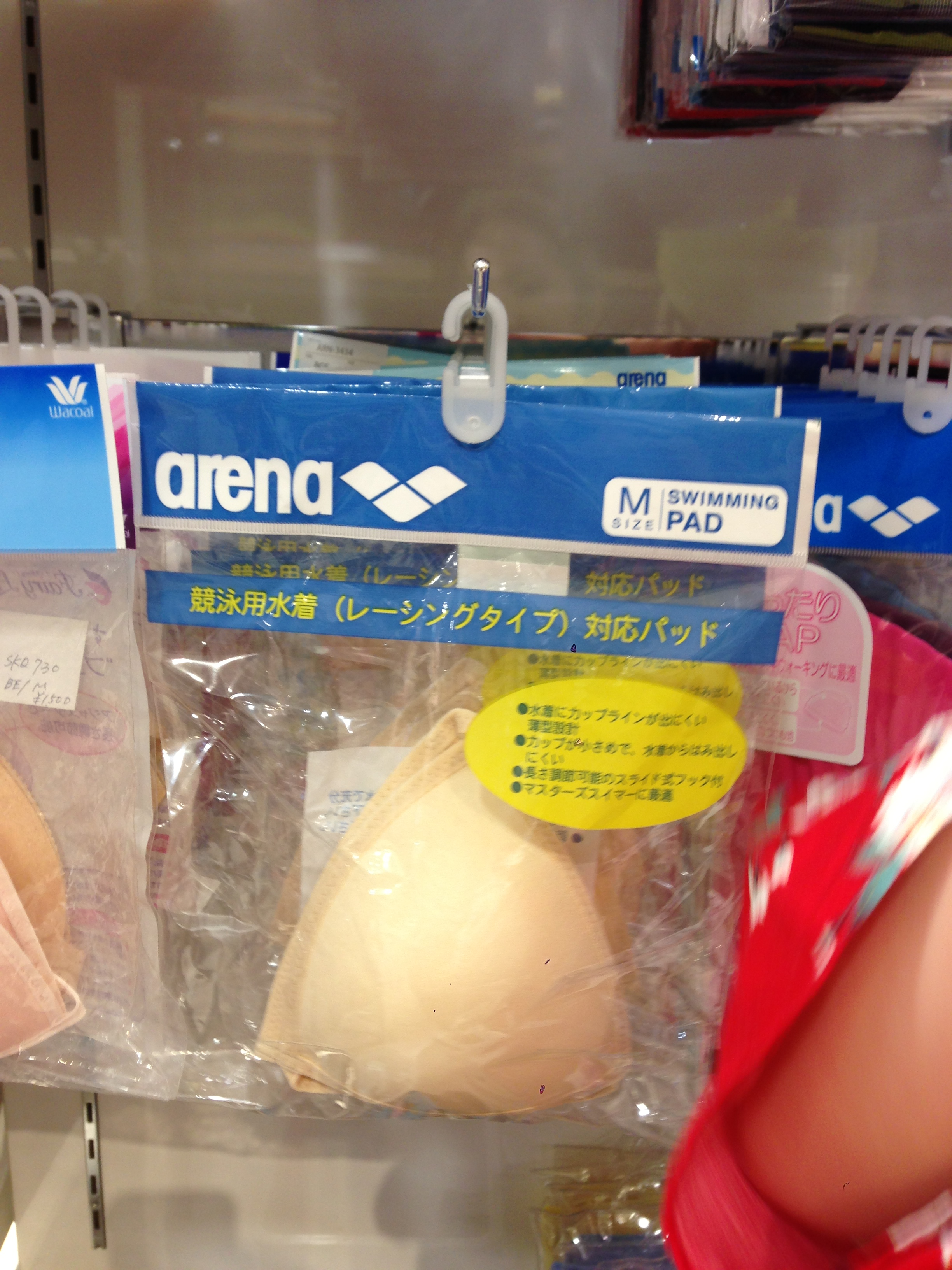 swimming pads